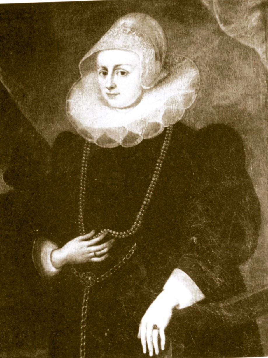 Elisabeth von Fürstenberg (1547-1587), erste Ehefrau von Kaspar von Fürstenberg